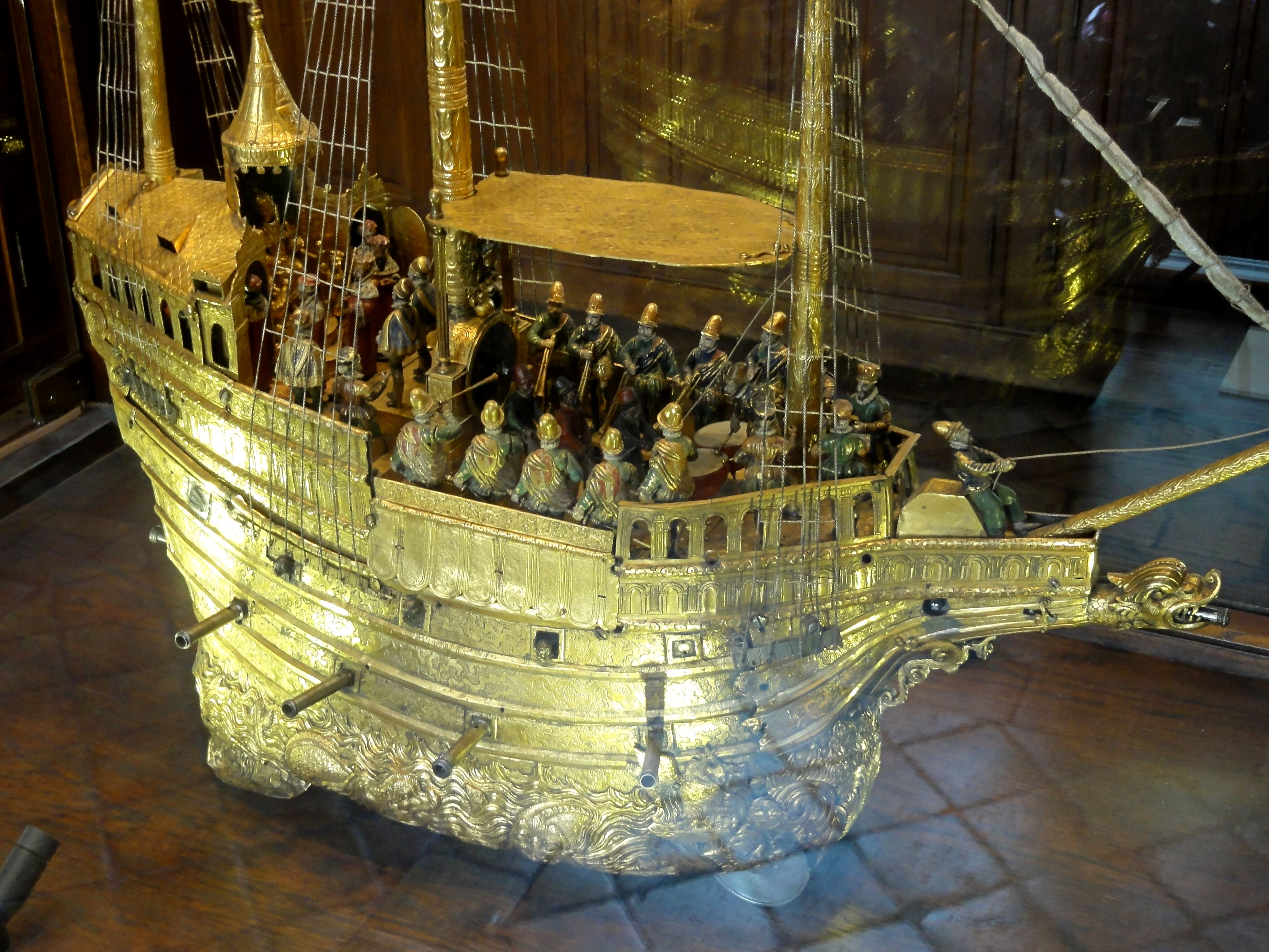 Nef dite de Charles Quint.